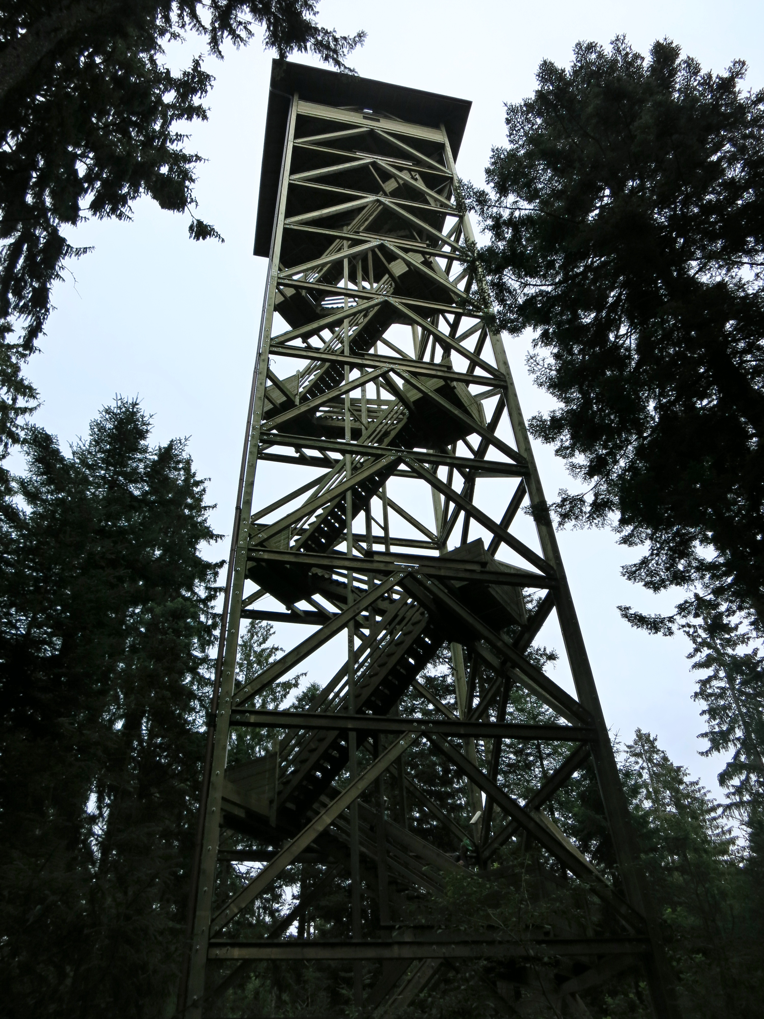 Chuderhüsiturm